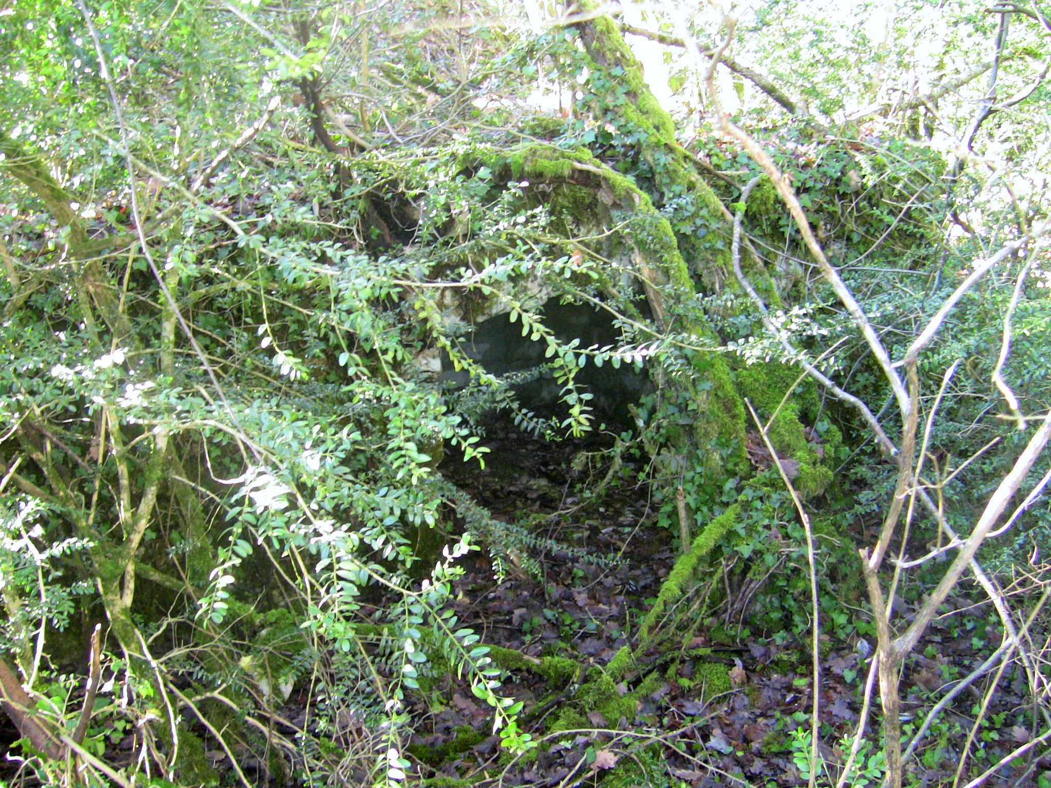 Abri de la crête sud du fort de Planoise, à Besançon (Doubs, France).